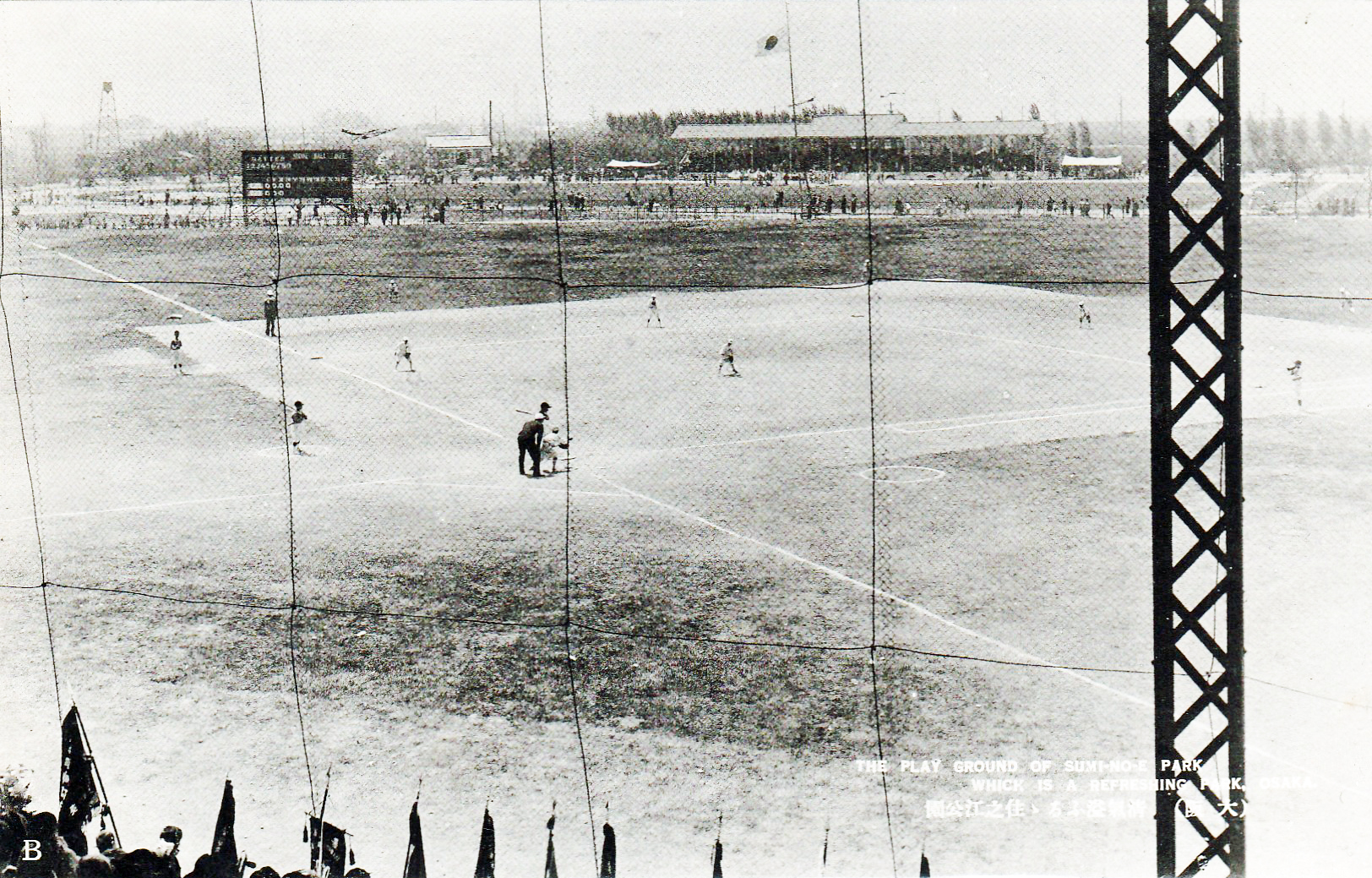 戦前の撮影と思われる住之江公園野球場。